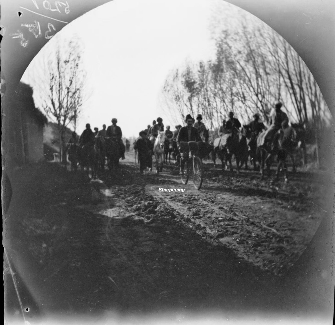 1891. Снимки Туркестана из альбома кругосветного путешествия на велосипедах Томаса Аллена